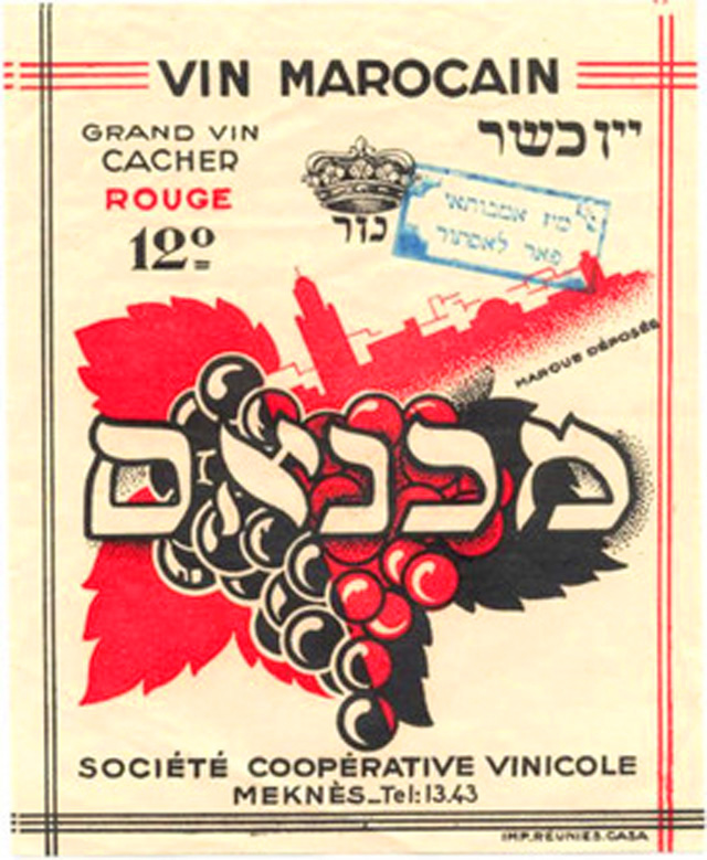 Étiquette de vin rouge casher pour un vin provenant de la société coopérative vinicole de Meknès